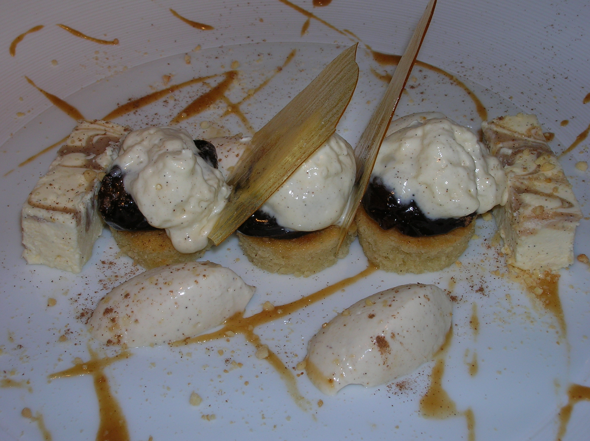 מסעדת תום אייקנס